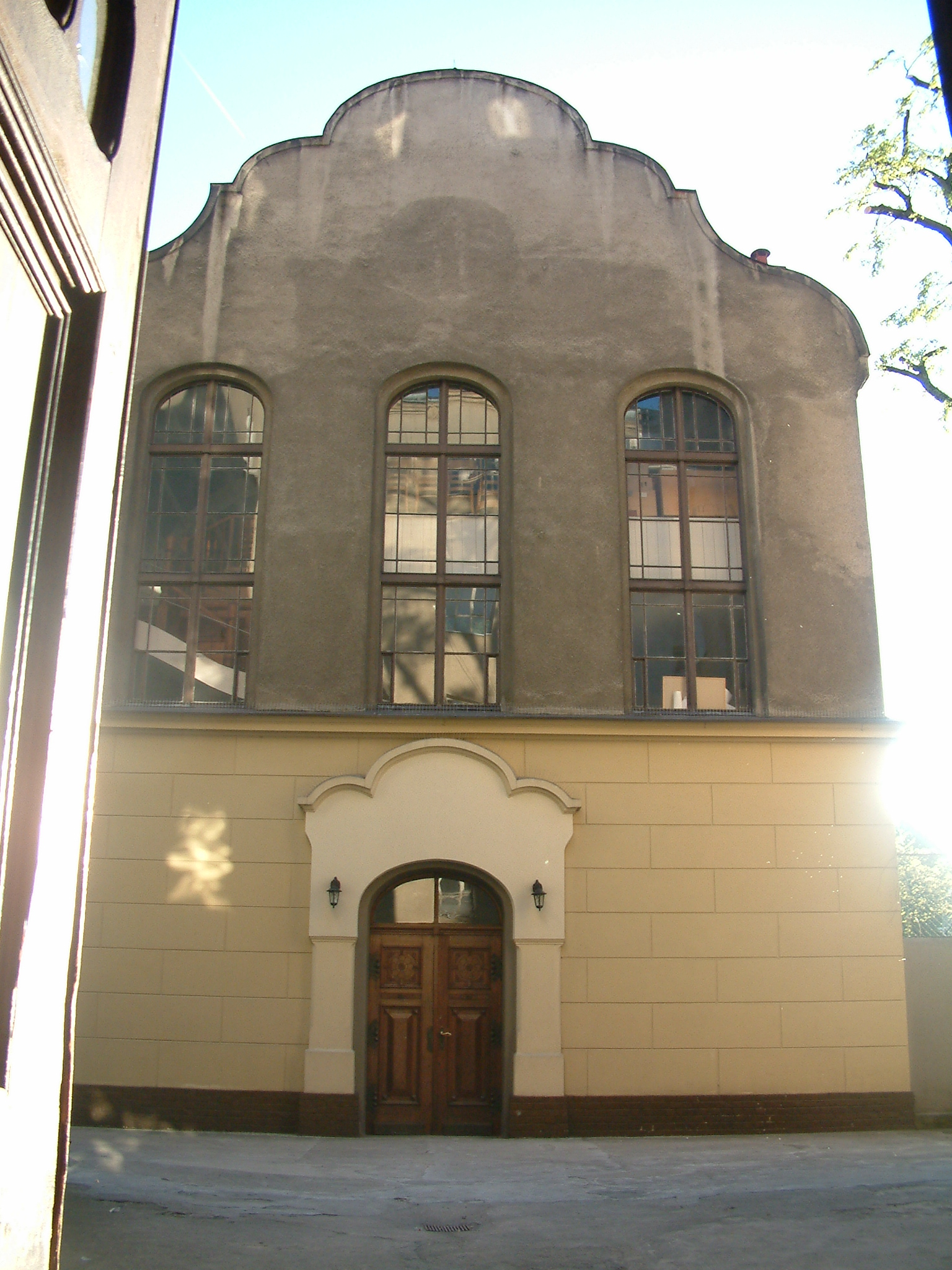 Baptist Chapel "Konoina" in Poznań